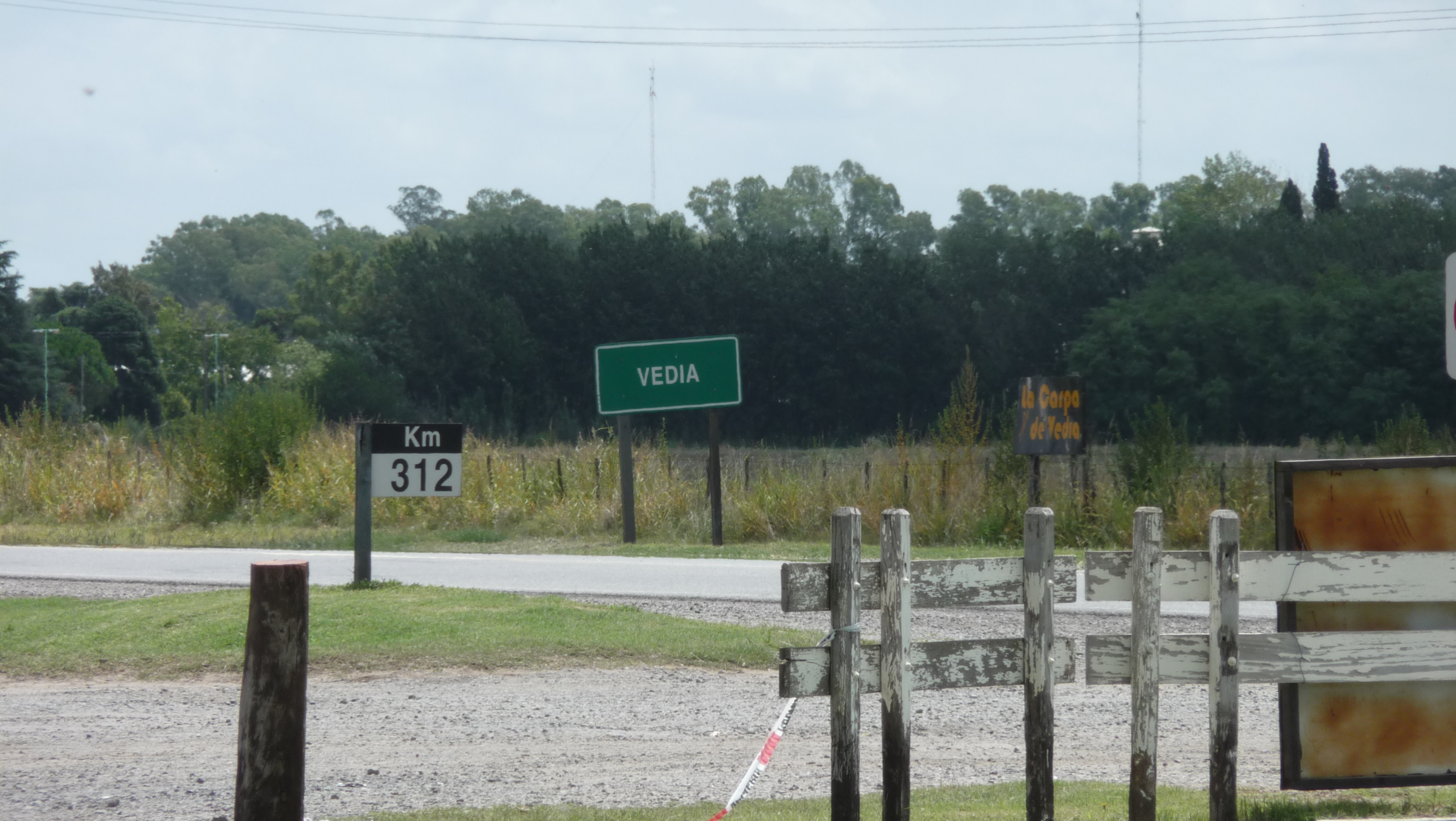 Tramo de la Ruta Nacional 7, en proximidades de la ciudad de Vedia.